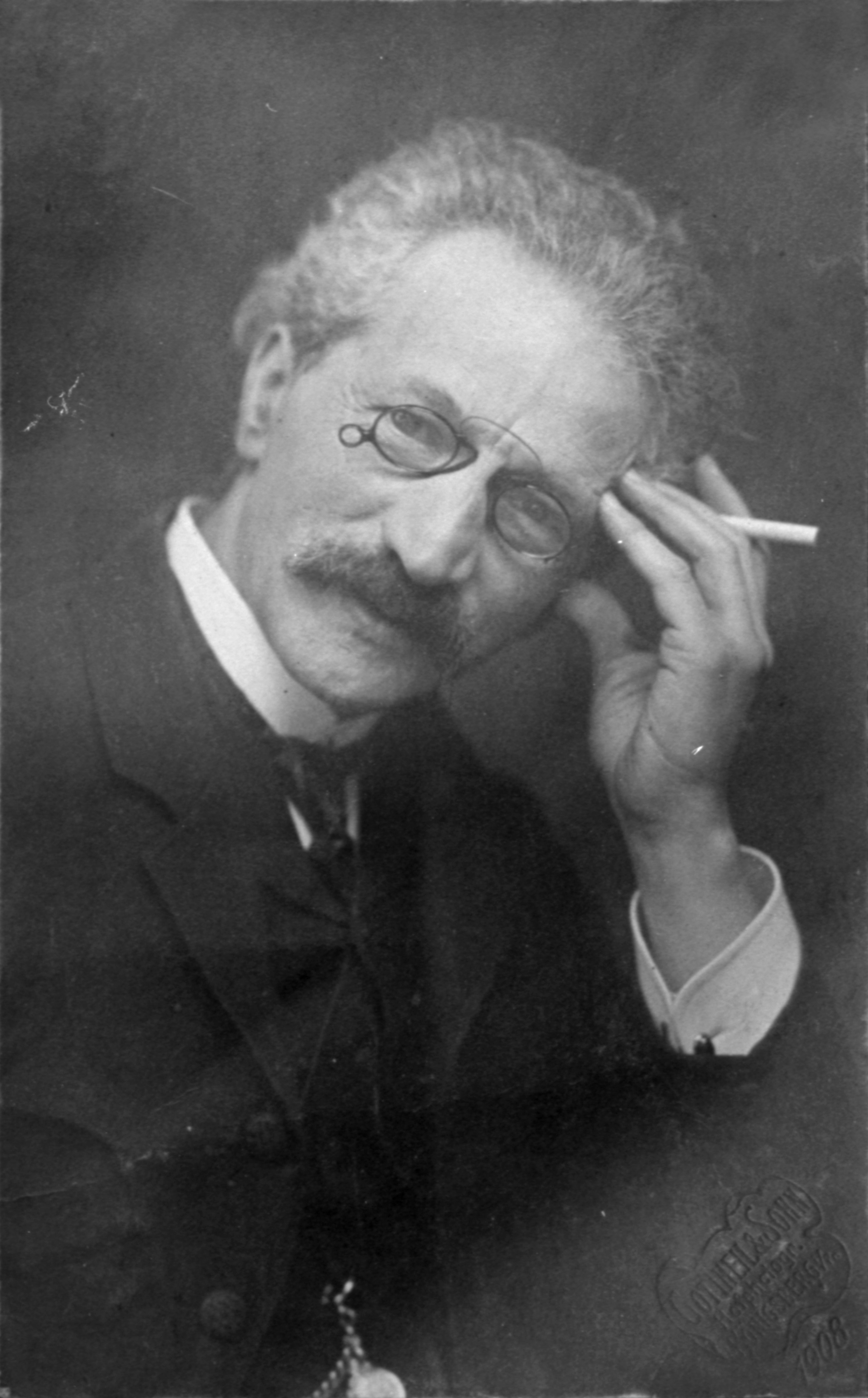 Porträtfotografie von Max Brode